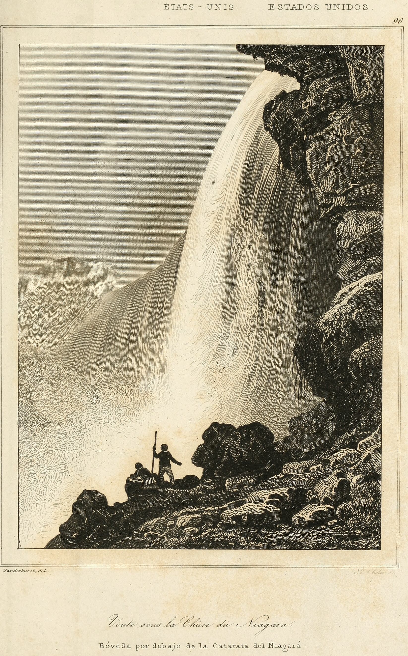 Chutes Niagara publié dans États-Unis d'Amérique par Roux de Rochelle (1762-1849), en 1853 Éditeur: Paris : Firmin Didot Fréres 614 pages